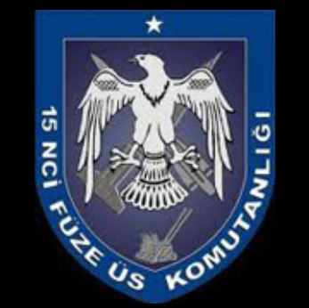 15.Füze Üs Komutanlığı